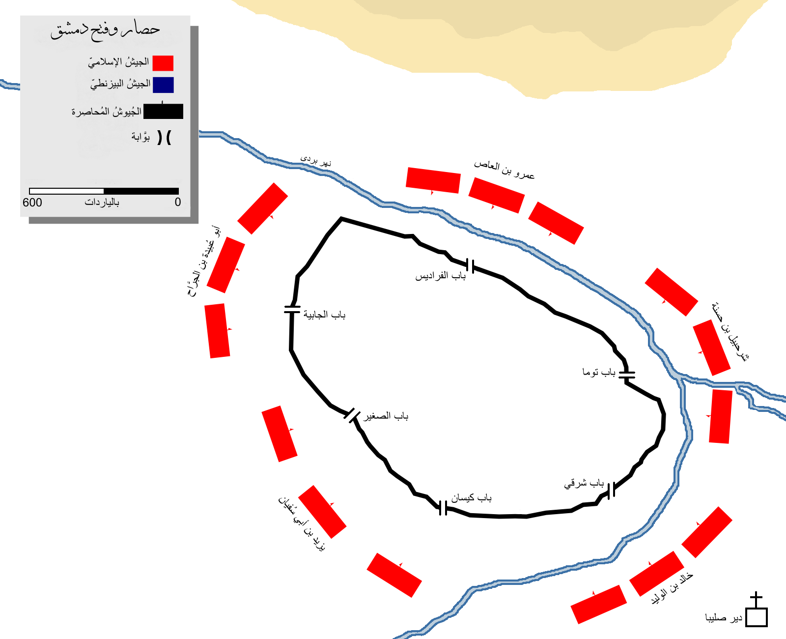 خارطة تُبيَّن الحِصار والفتح الإسلامي لِدمشق سنة 634م.